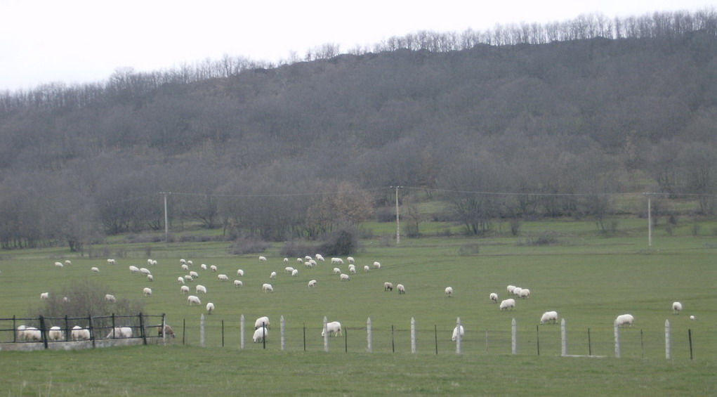 Canicosa de la Sierra, en Burgos (España)